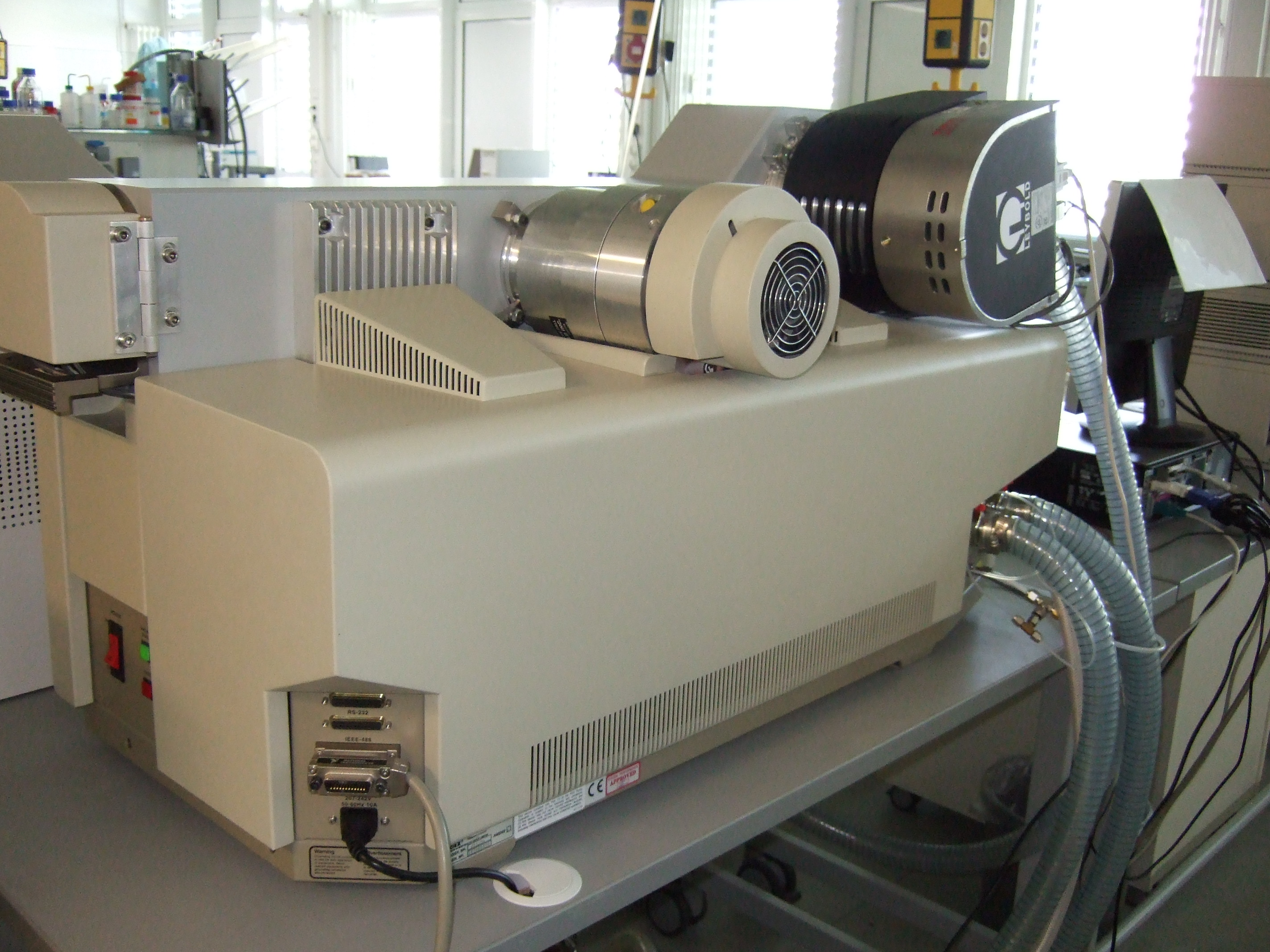 Triple Quad MS